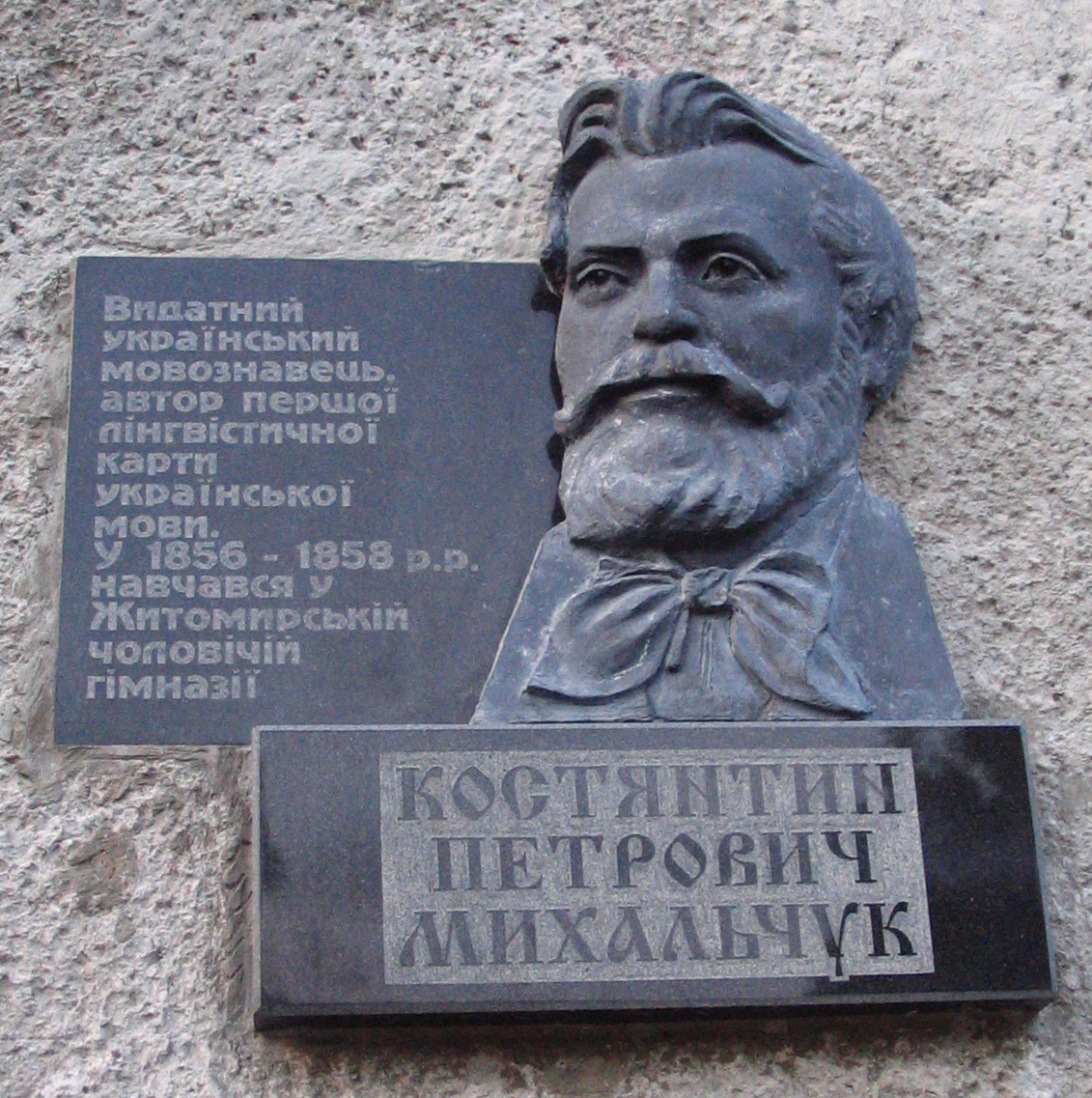 Михальчук Костянтин Петрович (1840-1914) — видатний український мовознавець та етнограф